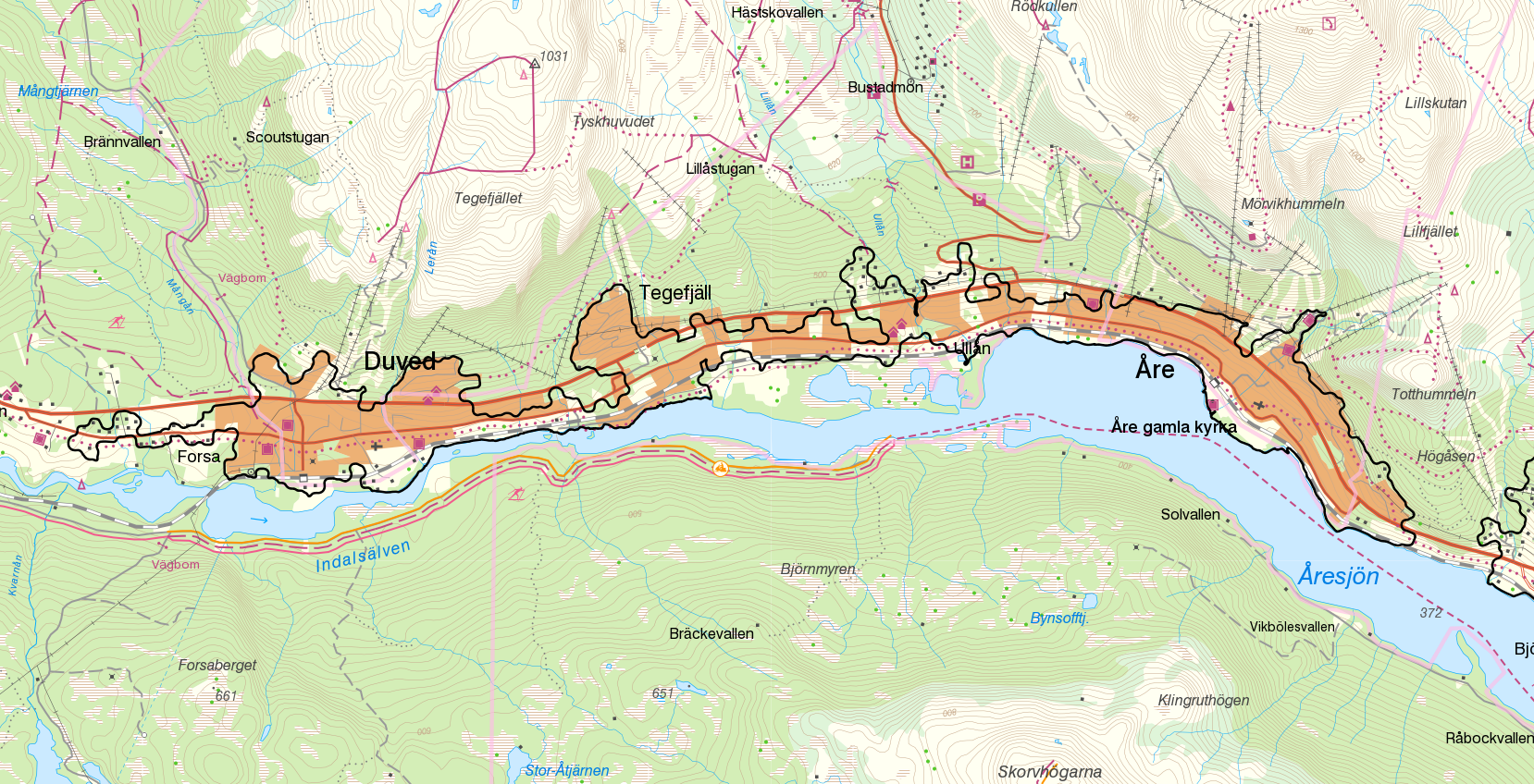 Tätorten Åre med gränserna från Statistiska centralbyråns tätortsavgränsning 2015 i svart. Bakgrundskarta från Lantmäteriet, skala 1:30 236.